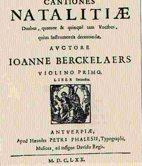 CANTIONES NATALITIÆ,. duabus, quatuor & quinquè tam Vocibus, quàm Instrumentis decantandæ, Auctore Ioanne Berckelaers, ANTVERPIÆ, Apud Hærredes PETRI PHALESII, Typographi, Musices, ad insigne Davidis Regis, M.D.C,LXX.